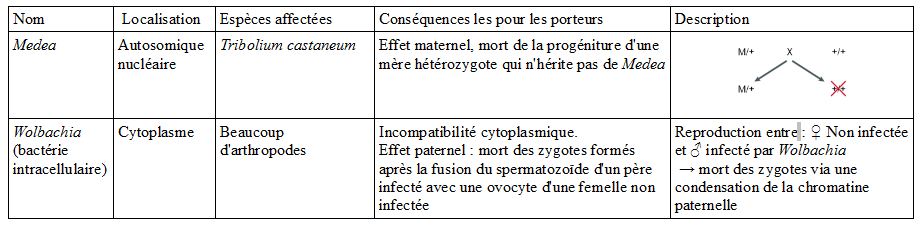 Tableau récapitulatif medea wolbachia